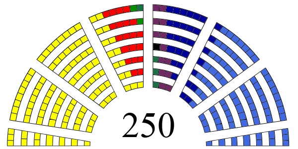 Parlamentarni izbori 2008 - raspodela mandata